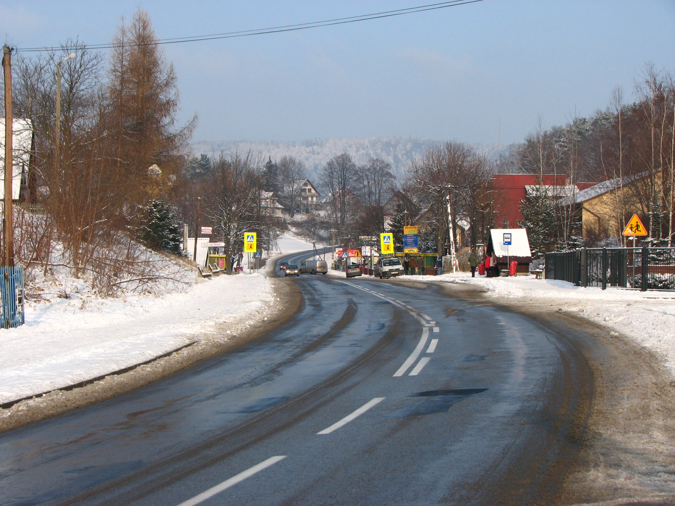 DW975 we wsi Gródek nad Dunajcem